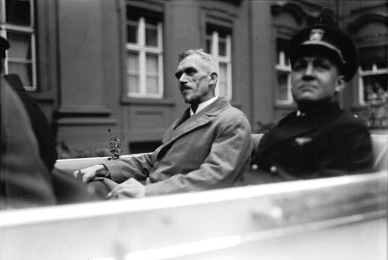 Der jubelnde Empfang des Luftschiffes "Graf Zeppelin" in der Reichshauptstadt Berlin! Der geniale Construkteur und Erbauer des "Graf Zeppelin" Dr. Dürr nach dem Empfang beim Reichspräsidenten von Hindenburg.